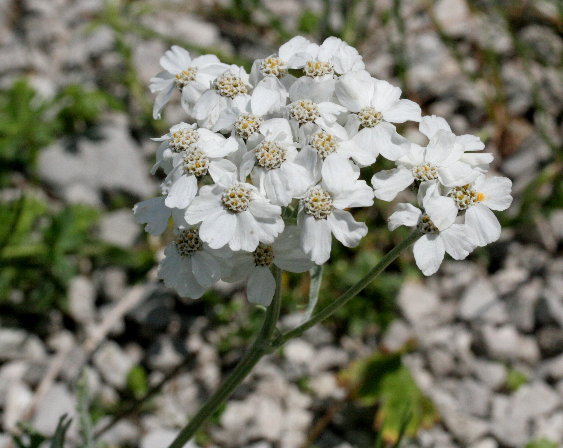 Località: "Giardino Botanico delle Alpi Orientali", Monte Faverghera (BL), 1500 m s.l.m.